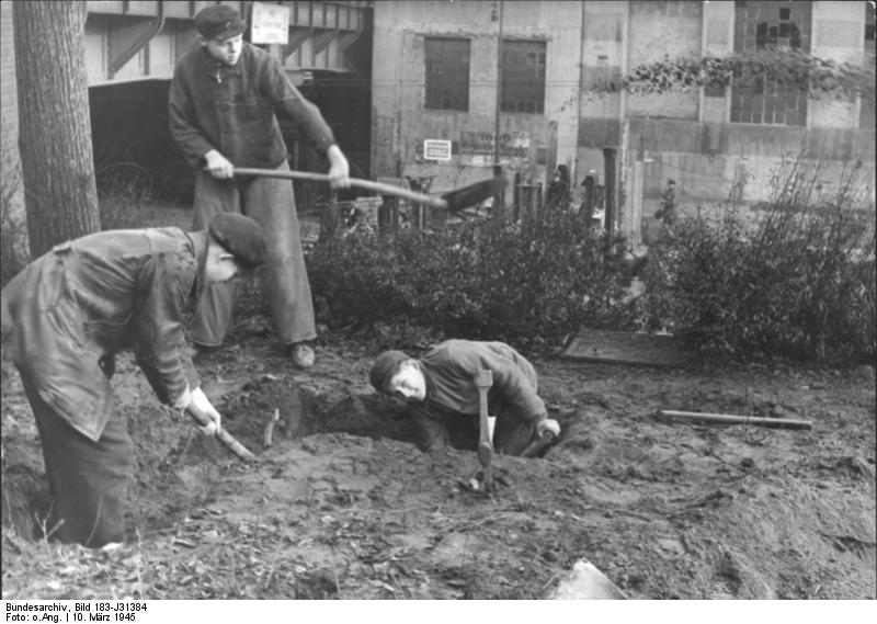 Berlin, Bau von Straßensperren ADN-ZB/Archiv Das faschistische Deutschland im II. Weltkrieg 1939-45 Berlin wird am 1. Februar 1945 zum "Verteidigungsbereich" erklärt. In der Nähe einer Panzersperre, die von Volkssturmsoldaten an einer Bahnunterführung errichtet wird, heben Hitlerjungen am 10. März Schützenstellungen aus. 343-45 Aufnahme 10. März 1945